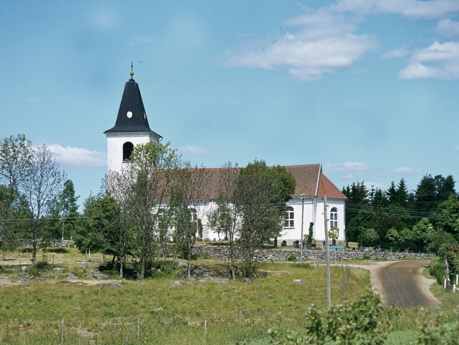 Murums kyrka